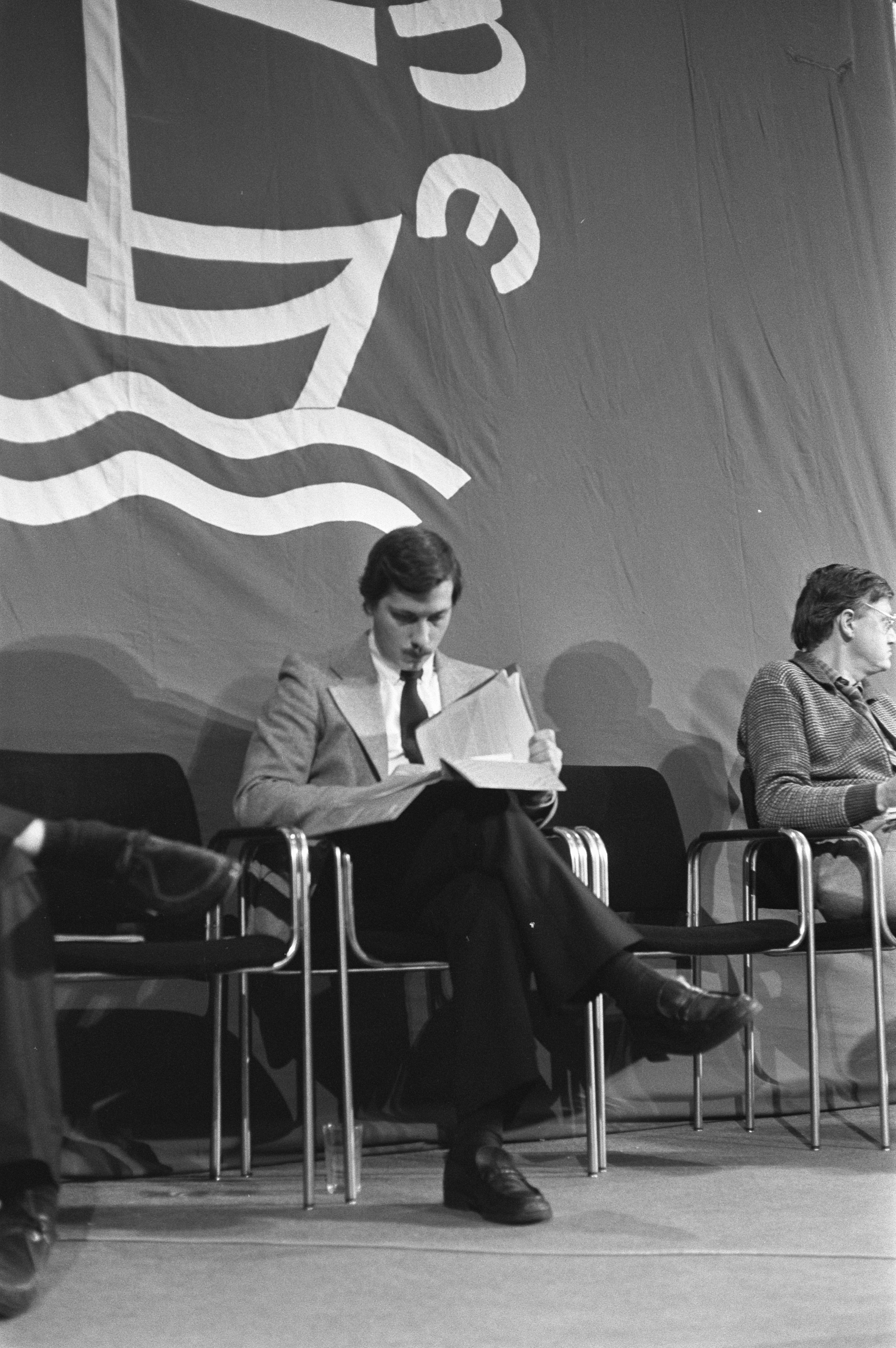 Collectie / Archief : Fotocollectie Anefo Reportage / Serie : Openbare hoorzitting over kernwapens en ontwapening, georganiseerd door de Wereldraad van Kerken in de VU Beschrijving : Alexei Arbatov (Rusland) Datum : 24 november 1981 Locatie : Amsterdam, Noord-Holland Trefwoorden : hoorzittingen Persoonsnaam : Arbatov, Alexei Fotograaf : [onbekend] Auteursrechthebbende : Nationaal Archief Materiaalsoort : Negatief (zwart/wit) Nummer archiefinventaris : bekijk toegang 2.24.01.05 Bestanddeelnummer : 931-8237